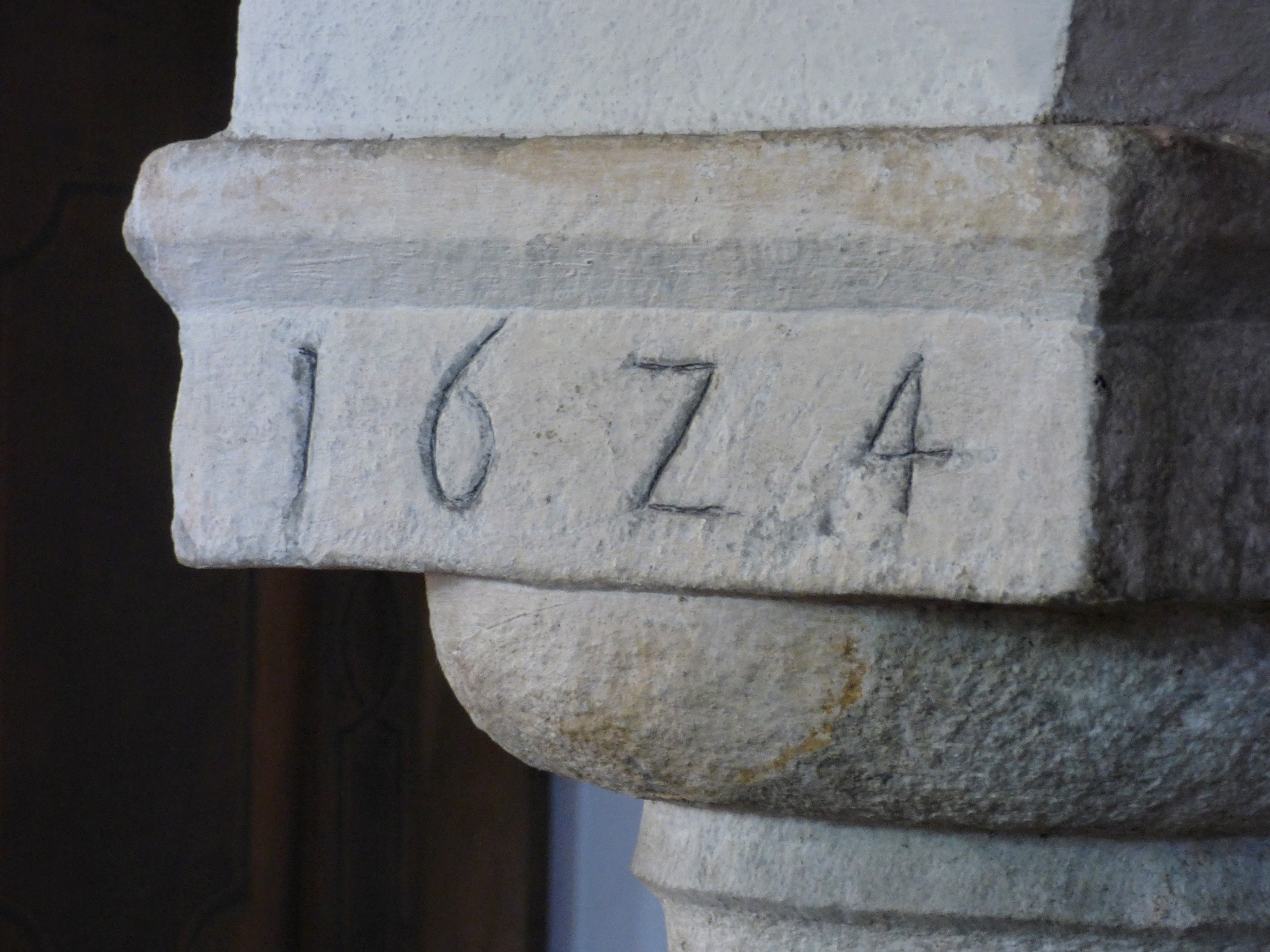 Kirche Hl. Erhard, St. Paul im Lavanttal (Kärnten). Jahreszahl 1624 (damals wurde die Kirche umgebaut).